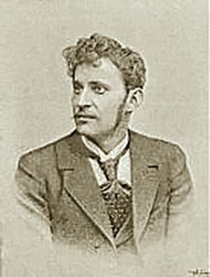 Josef Holub (1870 - 1957), Český malíř.